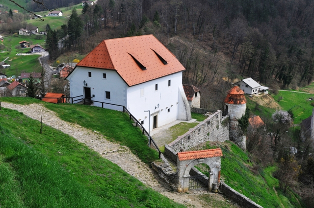 Lutrovska klet pod Gradom Sevnica